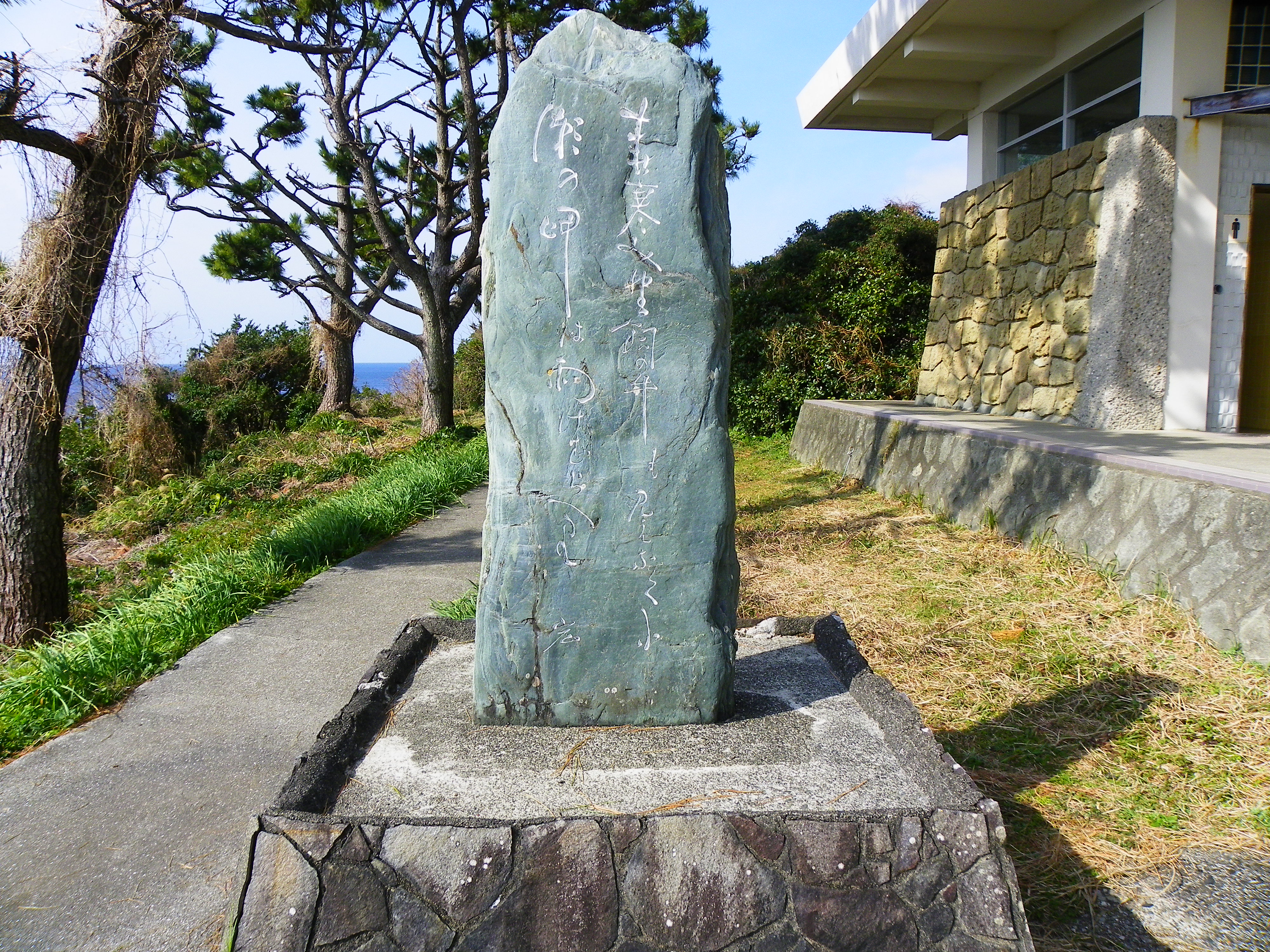 和歌山県串本町潮岬の下村宏（1875~1957）歌碑。釋文：春寒み 野飼の牛も見えなくに 潮の岬は 雨けむらへり。（坂本慎一『玉音放送をプロデュースした男 下村宏』（PHP研究所、2010年） 第10章 歌人・下村海南 153頁より）